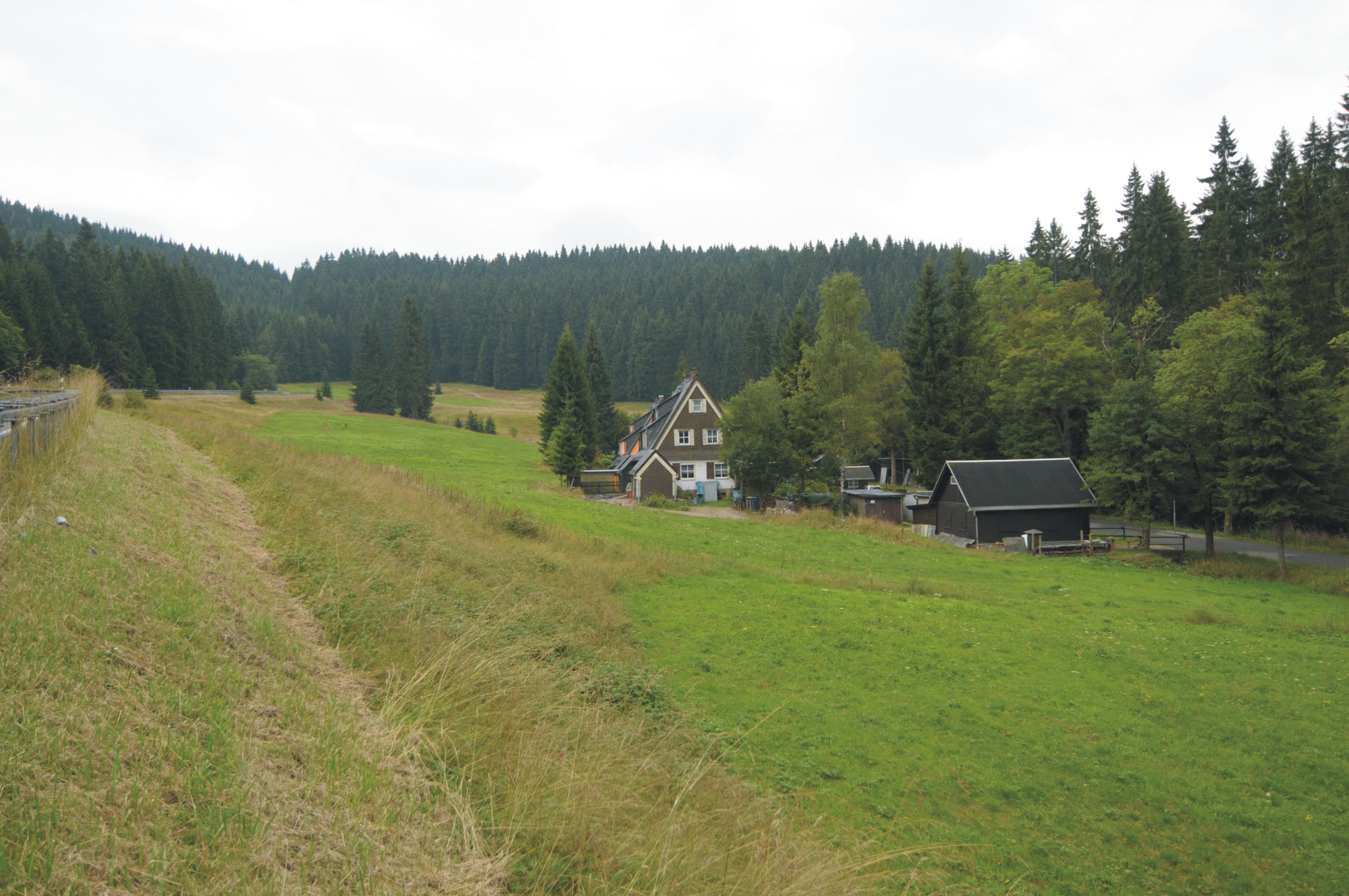 Oberwildenthal an der Straße zwischen Wildenthal und Johanngeorgenstadt (Gemeinde Eibenstock, Sachsen, Deutschland)